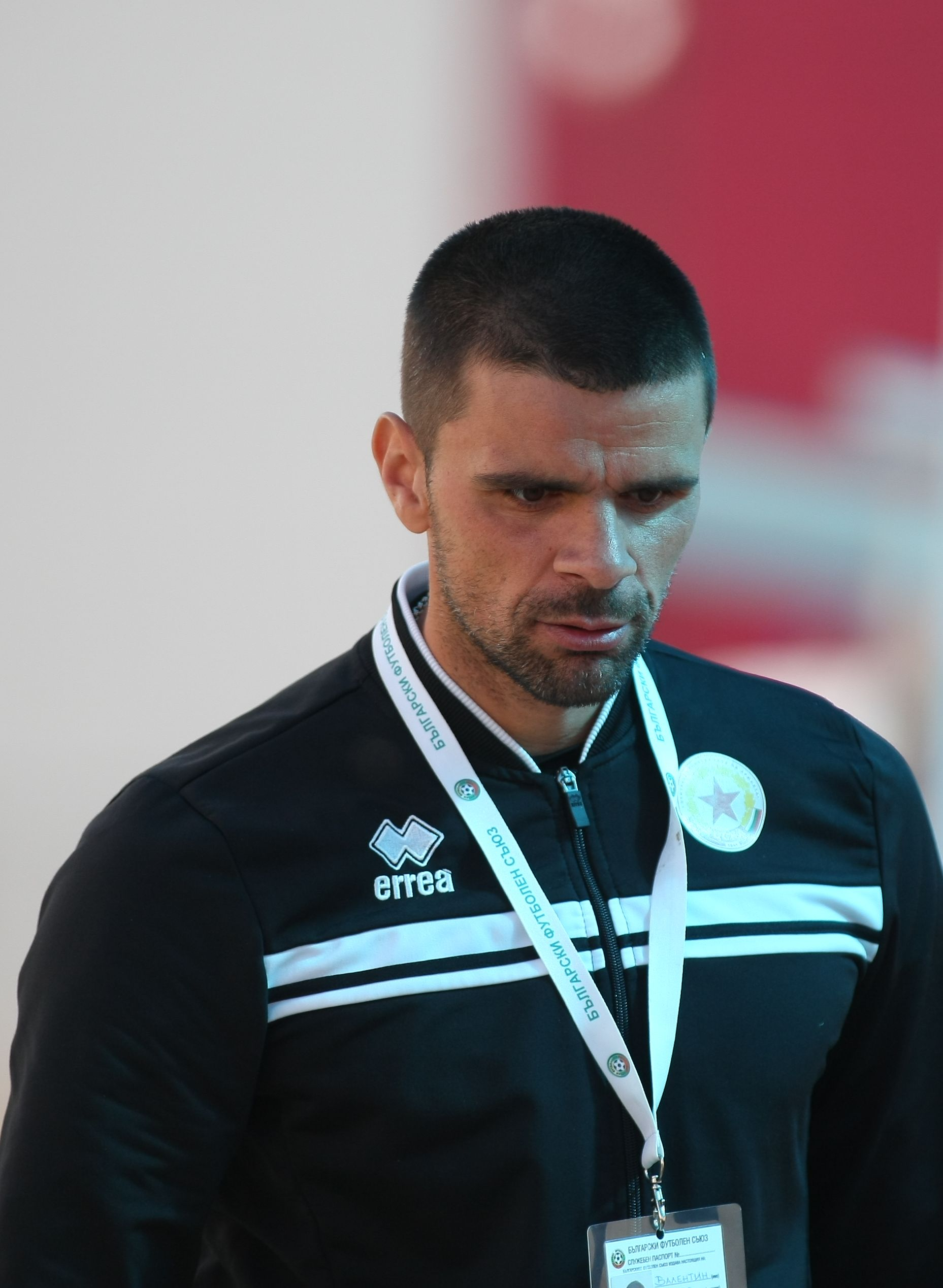 Валентин Илиев - бивш български футболист, национал, понастоящем треньор на ЦСКА 1948